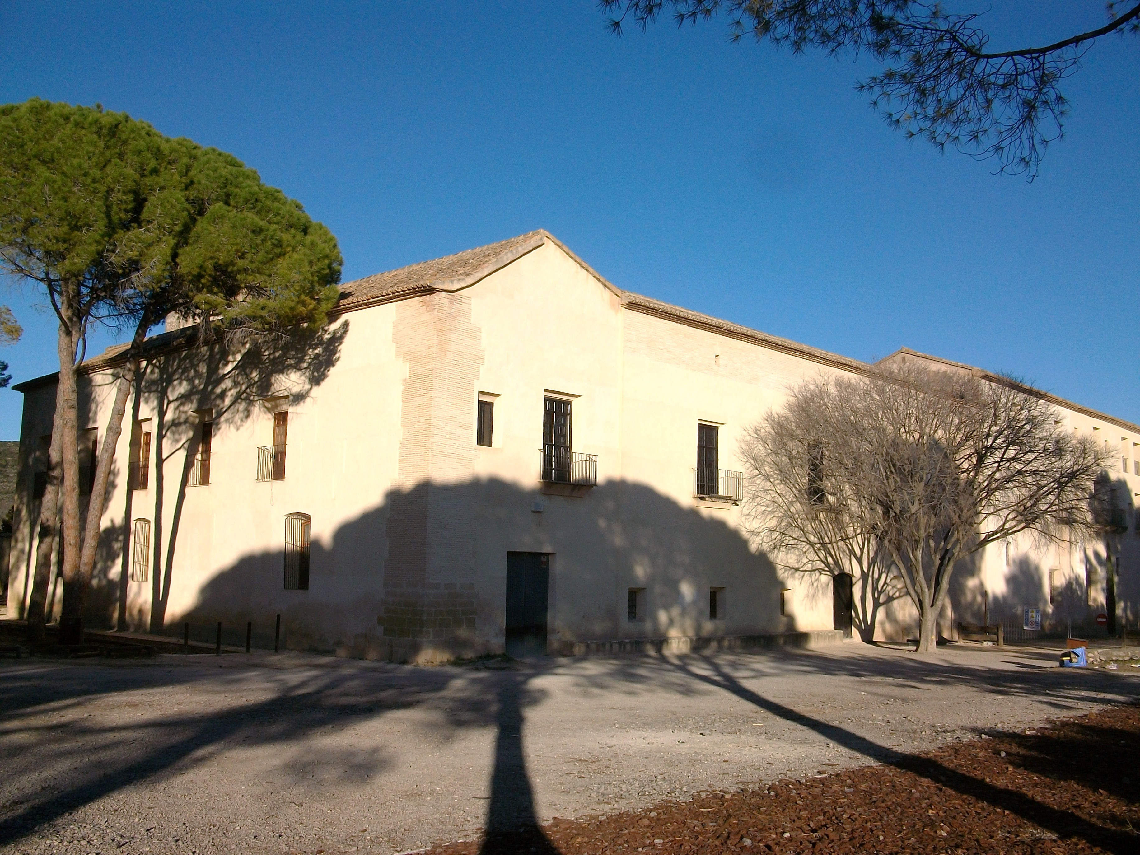 Monestir del Corpus Christi de Llutxent.